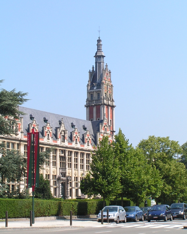 Bâtiment de l'Université libre de Bruxelles